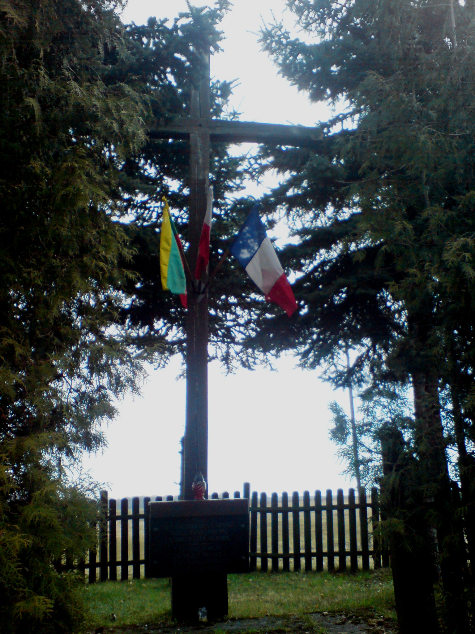 Krzyż w Grobi